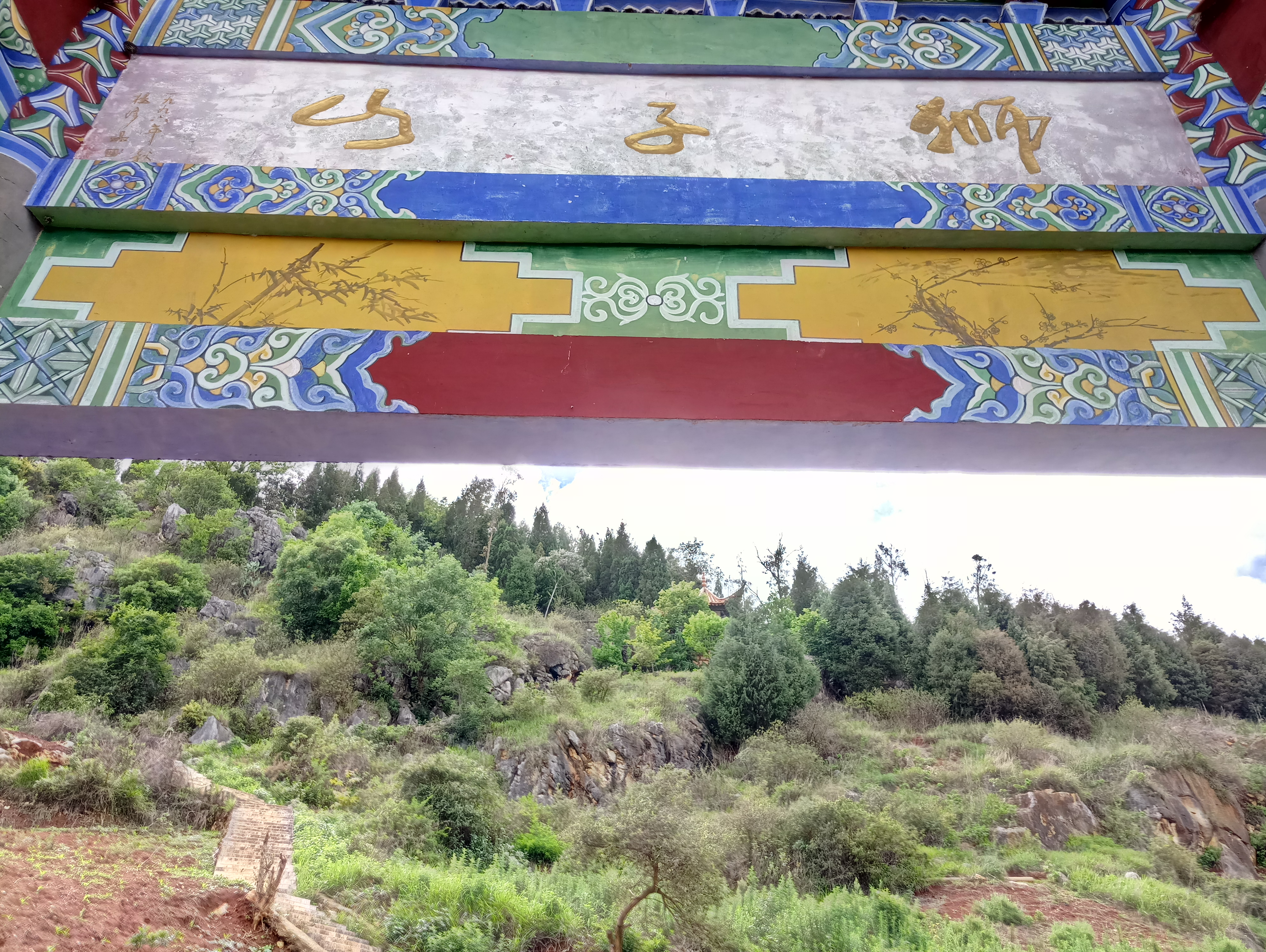 中文（中国大陆）: 石林县狮子山